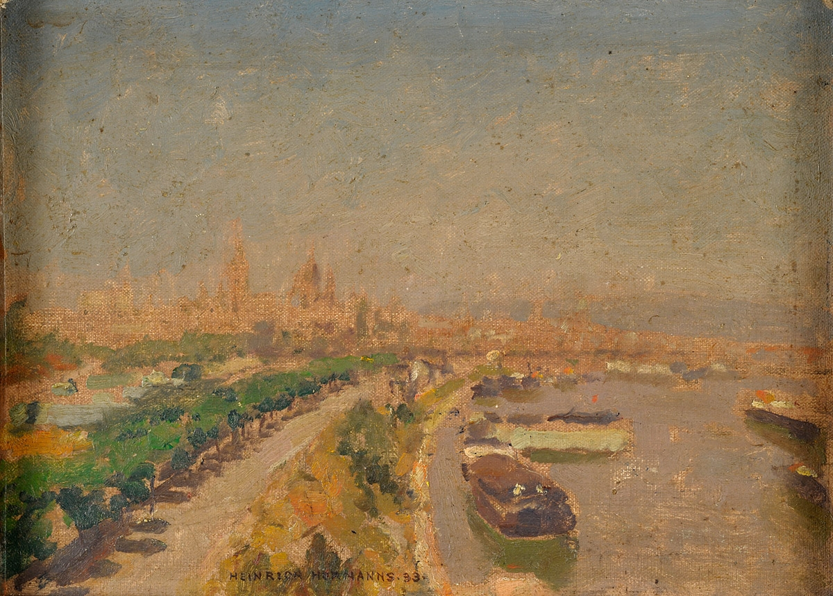 Blick auf Mainz. Signiert. Rückseite betitelt. Öl auf Malkarton, 25 x 34 cm